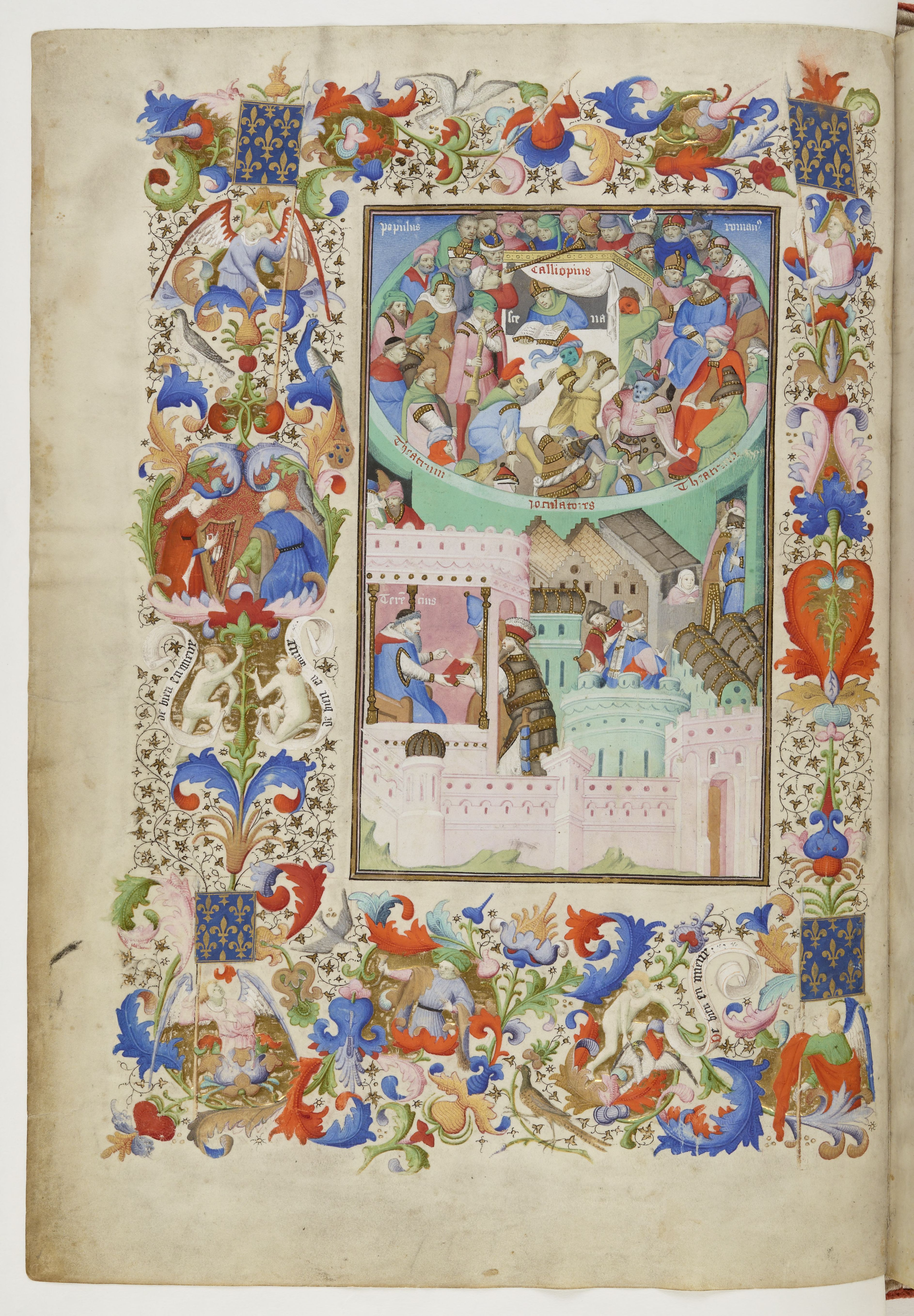 Frontispicio miniado del códice llamado Terence des Dusc, una recopilación de obras del comediógrafo latino Terencio